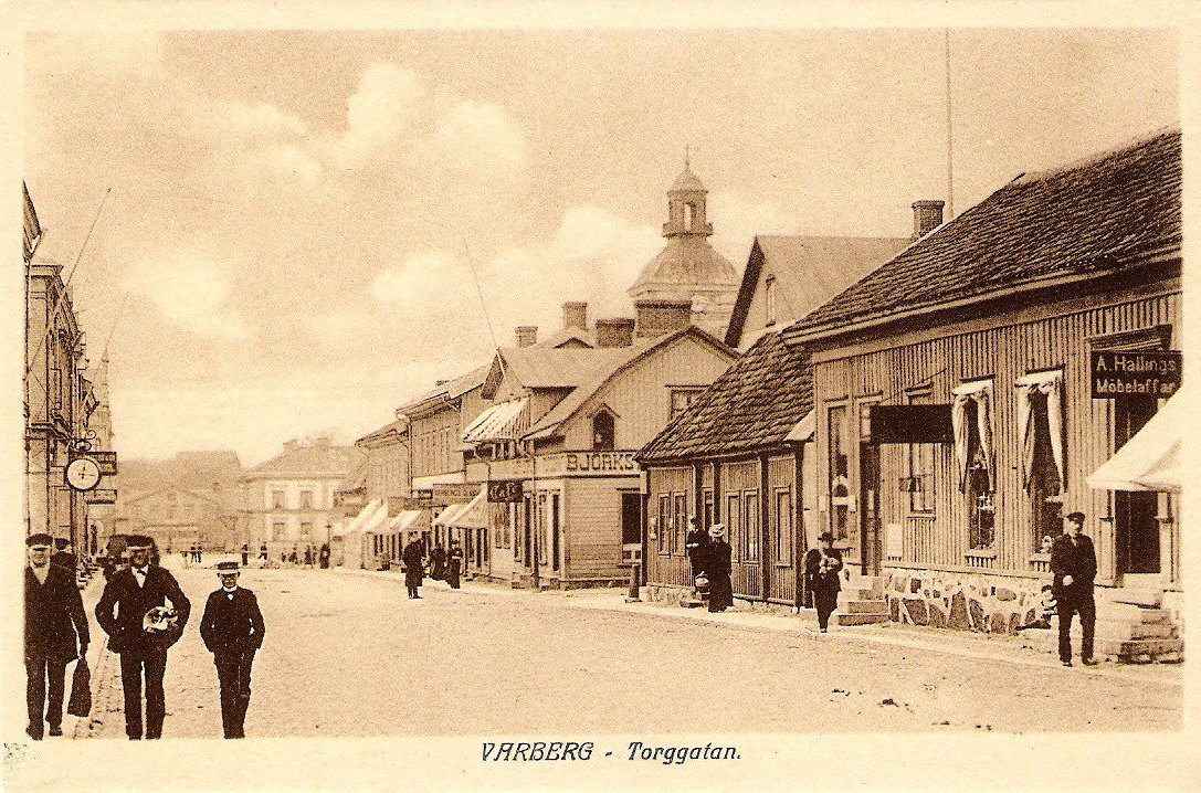 Torggatan i Varberg, vykort från 1900-talets början.